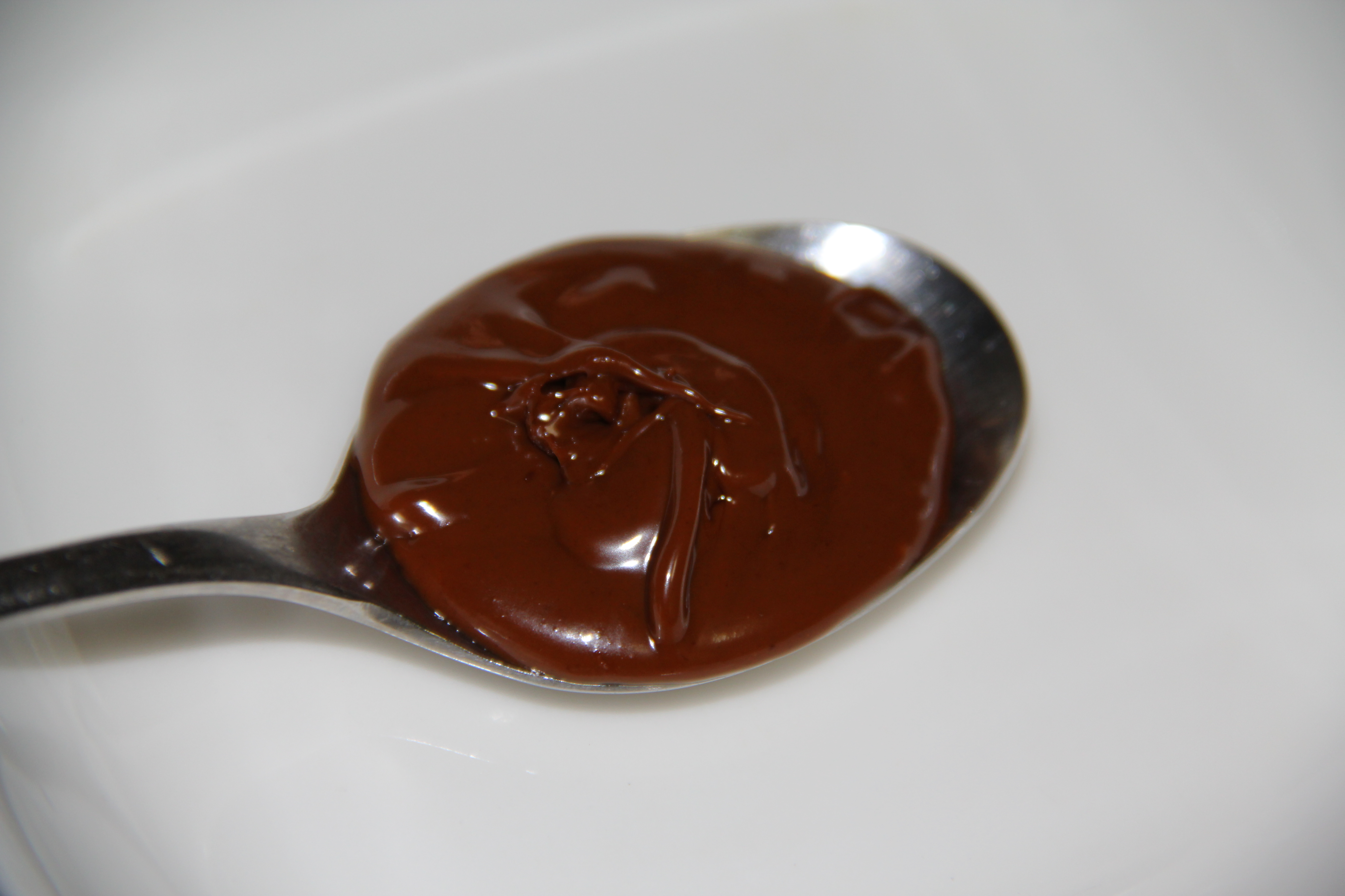 Almond Praline Paste